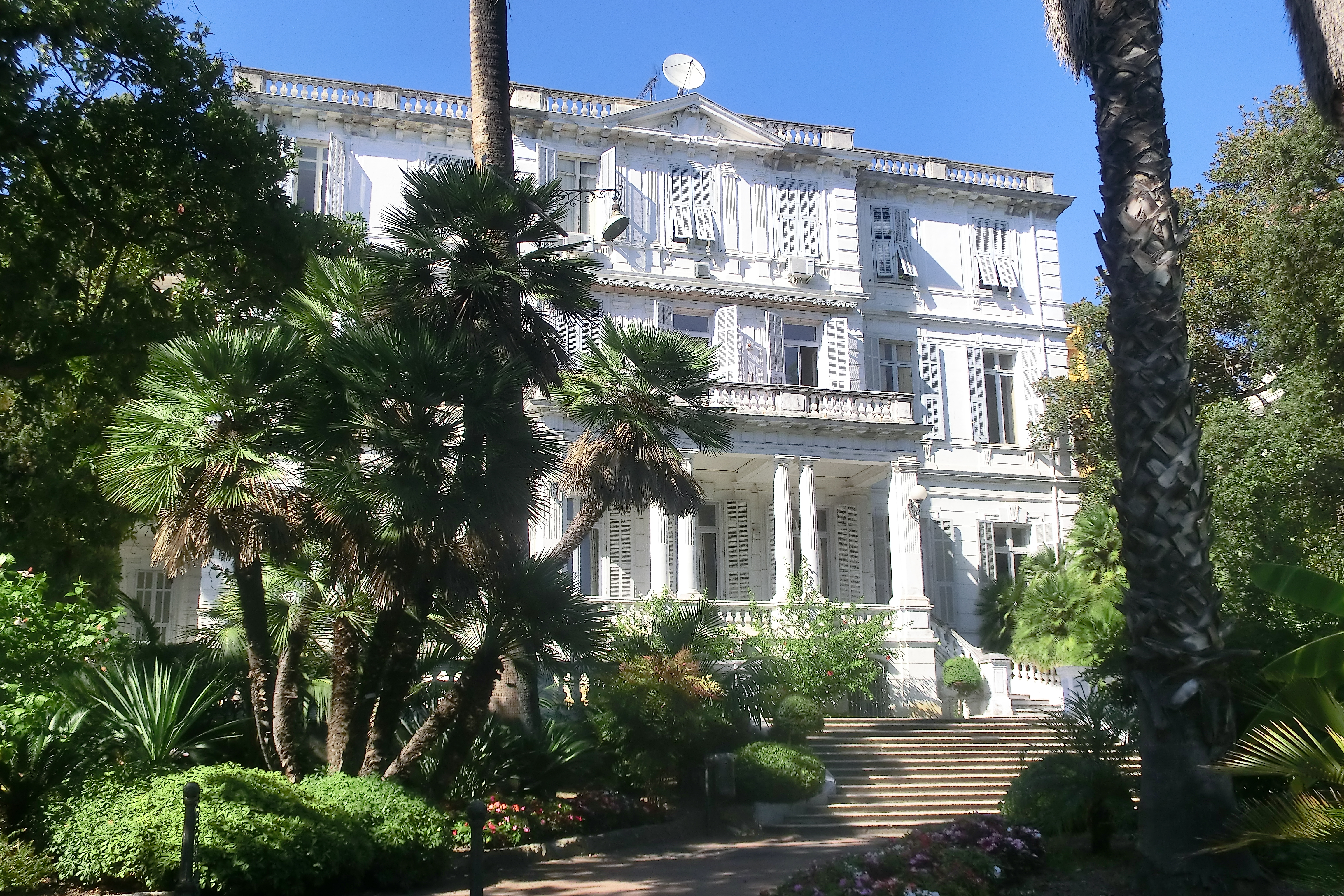 Villa Zirio